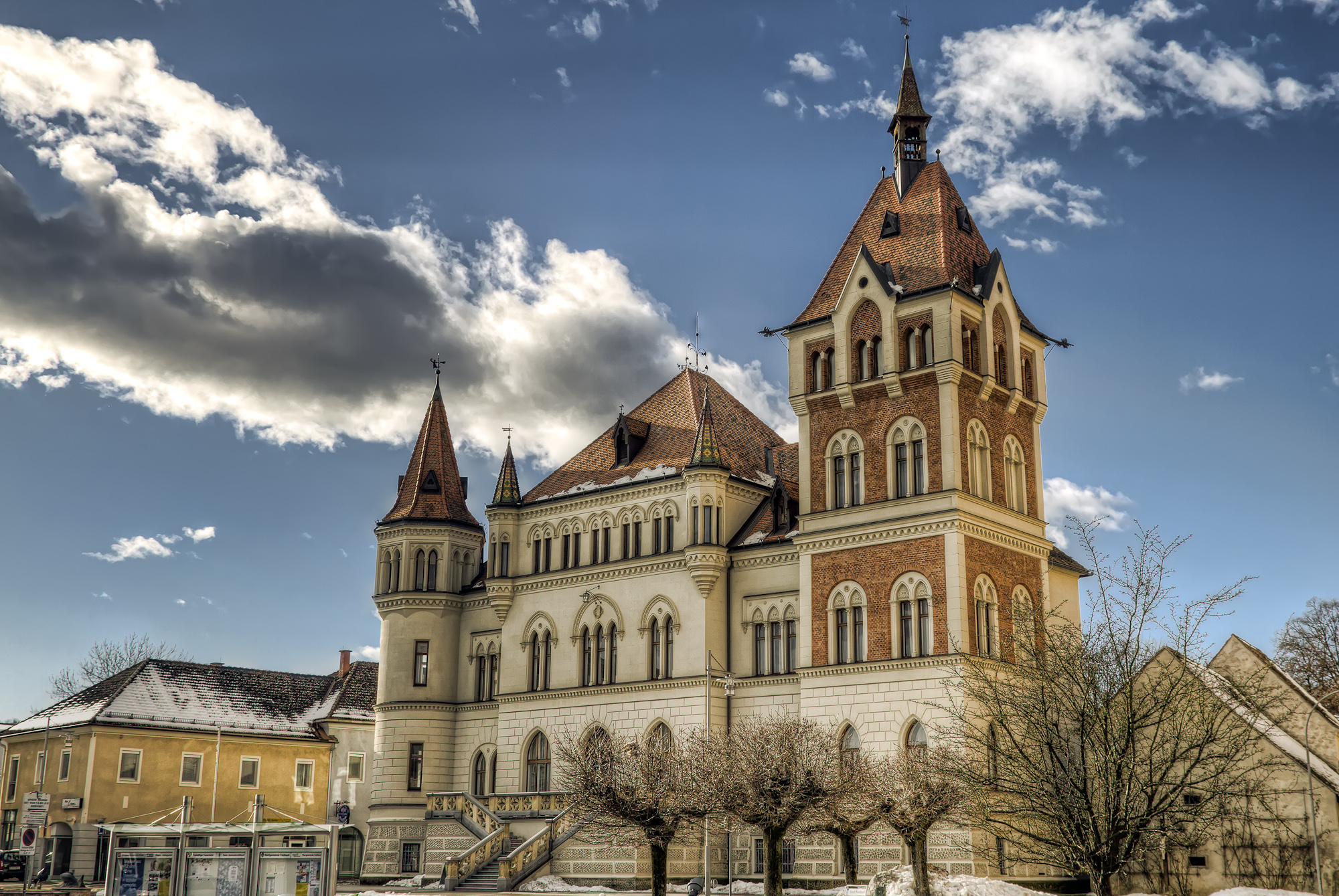 Musikschule, ehem. Sparkasse, Villa Hold, Feldbach